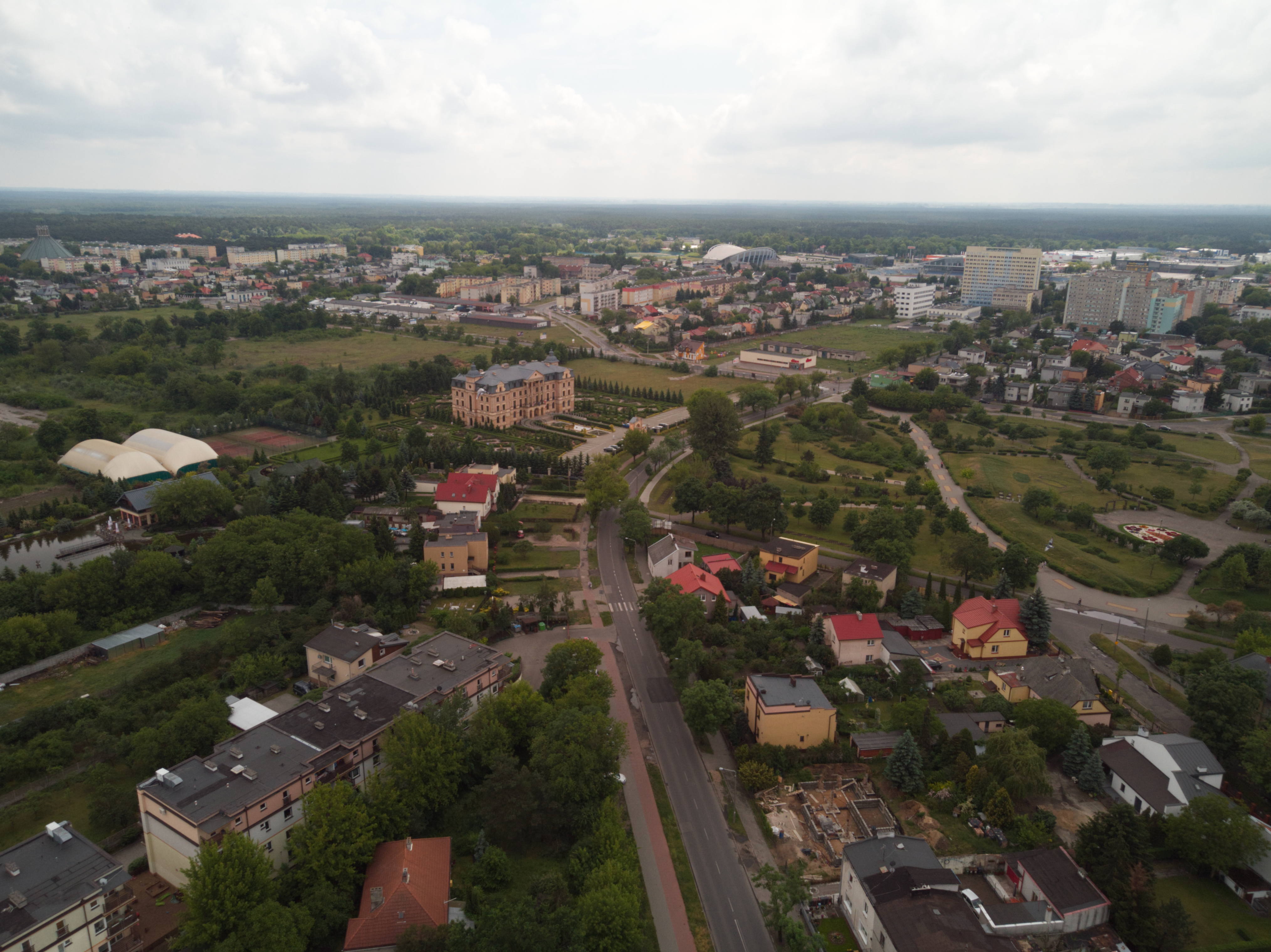 Styk Śródmieścia i Kazimierza Wielkiego (2020 r.)